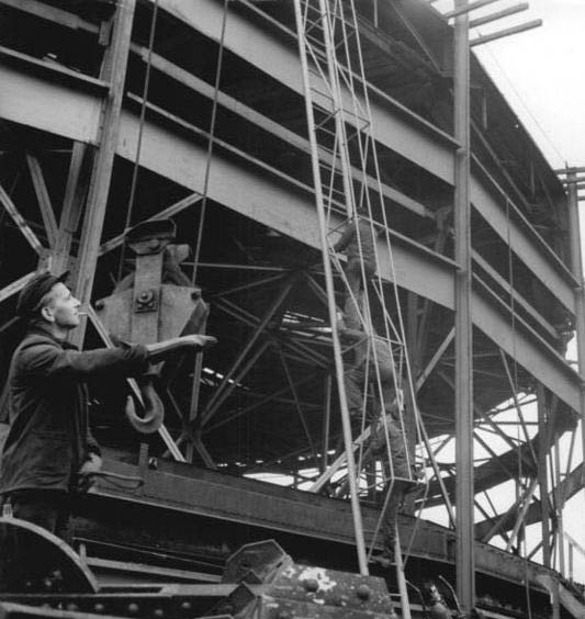 Berlin, tschechische Gastarbeiter Zentralbild Eckleben We-Nos 15.10.1960 Internationale Brigarden bauen Scheibengasbehälter in Berlin Zwei Brigarden mit Monteuren aus der CSSR und der DDR arbeiten gemeinsam an einem Scheibenbehälter, der in Berlin-Lichtenberg aufgesellt wird. Diese Anlage, mit einer Höhe von 85 m und einem Durchmesser von 53 m hat ein Fassungsvermögen von 150000 cbm Gas und wird dazu beittragen, die Gasversorgung in den Stadtbezirk en Köpenick, Grünau und Rahnsdorf zu etablieren und die Druckverhältnisse zu verbessern. Laut Plan soll der Behälter am 1.10.1961 fertig werden, jedoch haben sich die am Bau beteiligten Kollegen vorgenommen, diesen Termin zu unterbieten. Bereits jetzt haben sich einen Planvorsprung von ca. 4 Wochen erreicht. UBz: Schlosser Hans Hern weist den Kranführer ein.